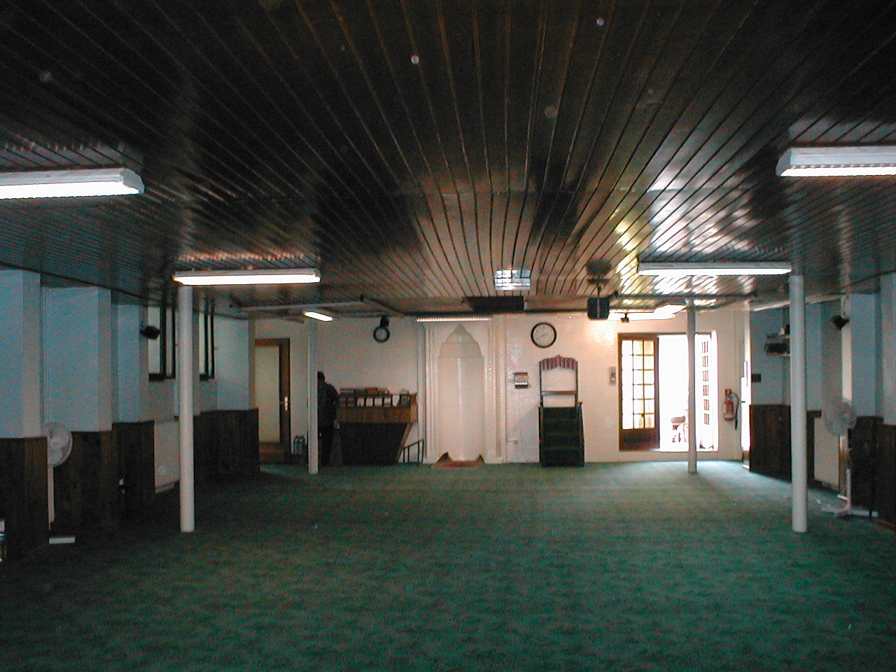 Intérieur de la Mosquée An Nour, Mulhouse